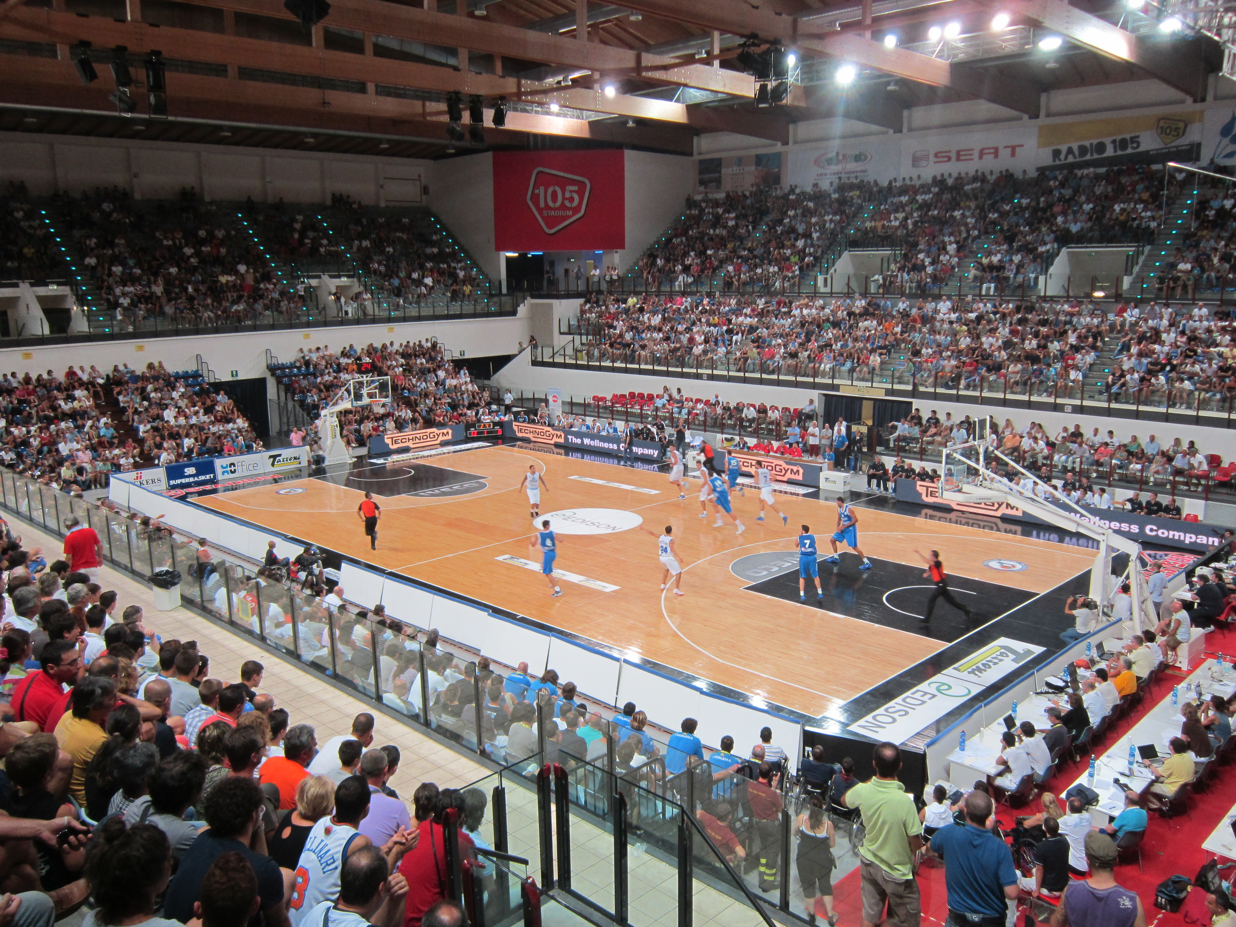 Il 105 Stadium di Rimini durante la sfida fra le nazionali maggiori di Italia e Grecia, gara conclusiva del Trofeo Tassoni, manifestazione amichevole in preparazione agli Europei 2011.